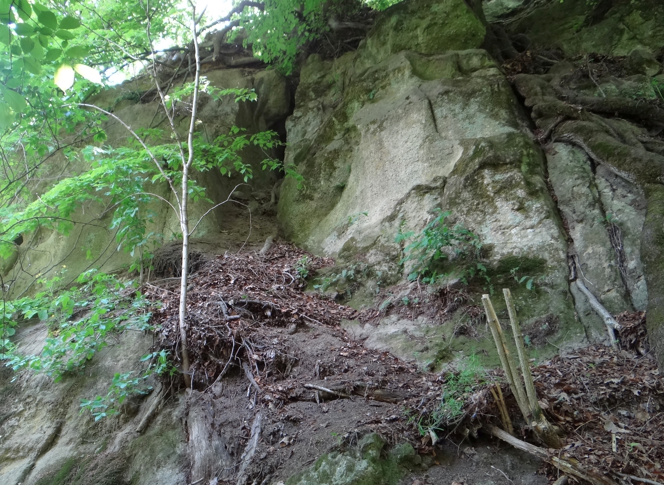 Jaskinia Zamkowa (Melsztyn)